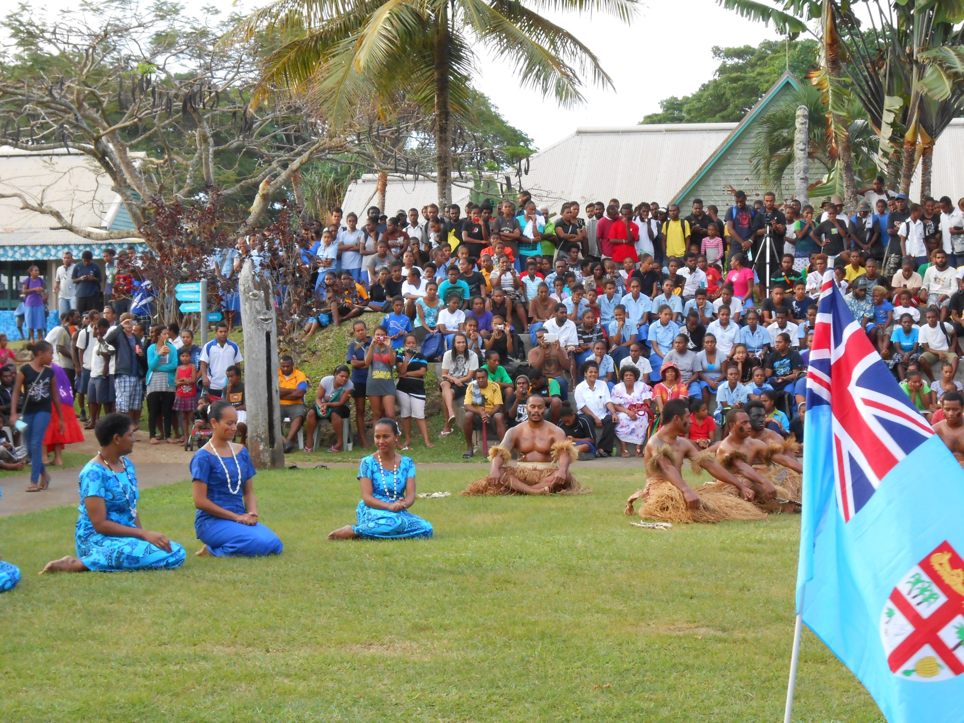 Fiji